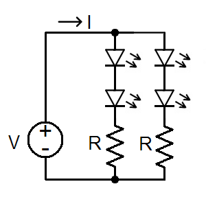 當總LED順向偏壓高於電源電壓時的線路接法。